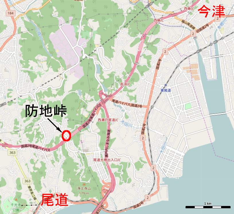 2017年現在の広島県尾道市防地峠を示したもの This map may be incomplete, and may contain errors. Don't rely solely on it for navigation.